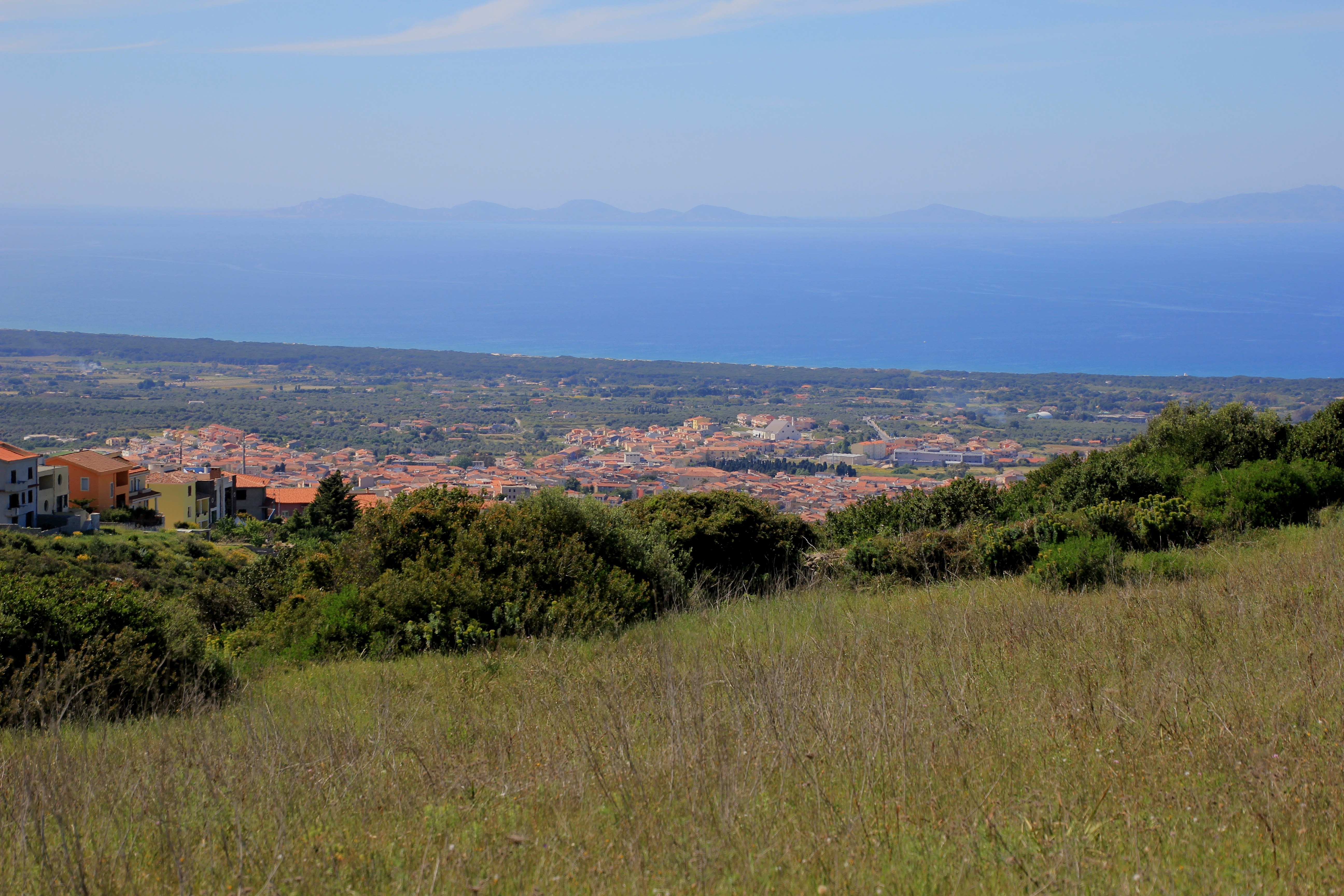 Sorso - Panorama